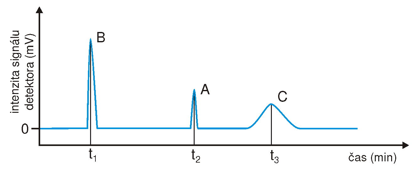 chromatogram